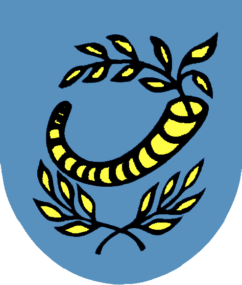 Herb Wieszcząt w powiecie bielskim, gminie Jasienica